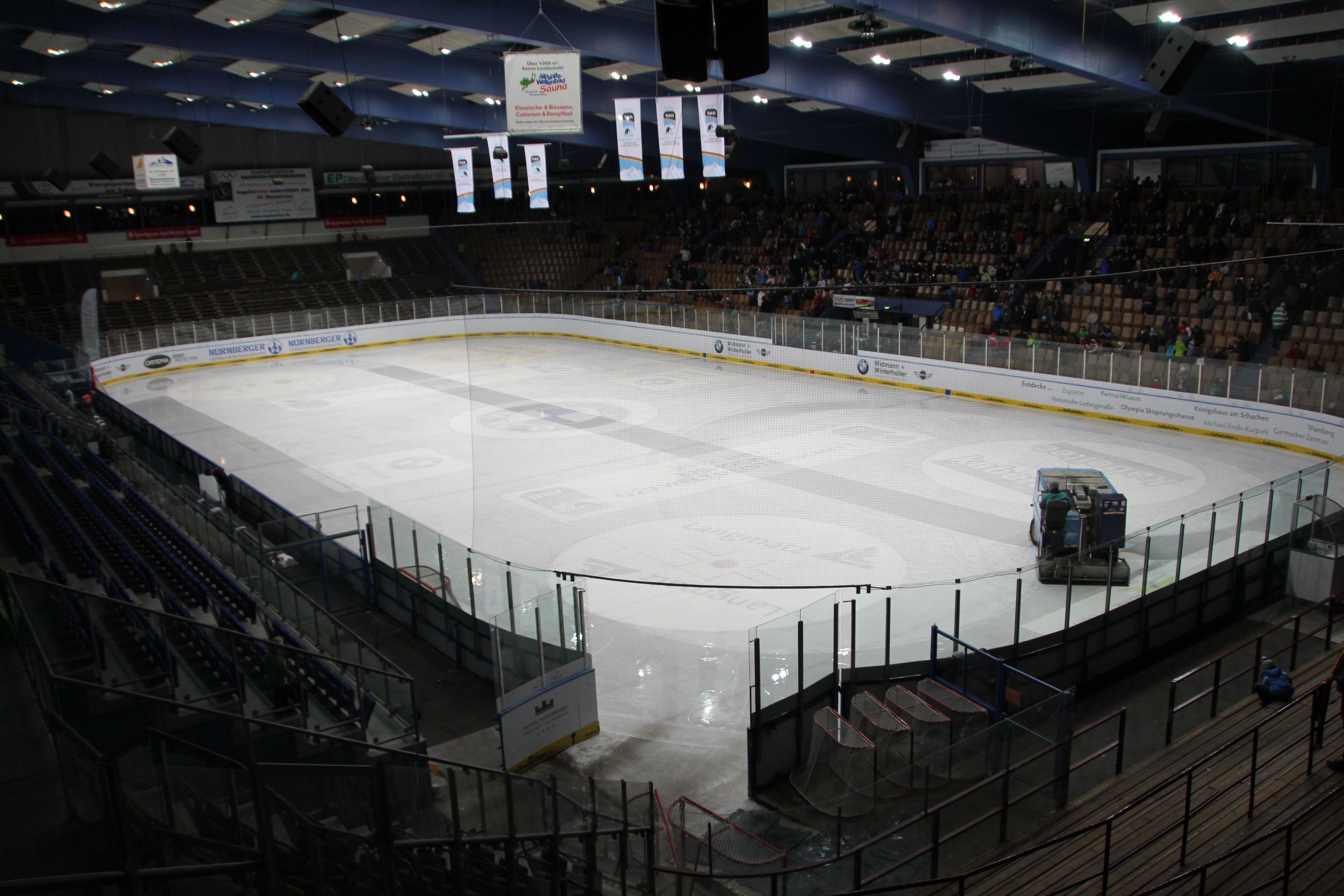 Innenansicht des Olympia Eissport Zentrums Garmisch-Partenkirchen von Süd-Osten nach Nord-Westen.